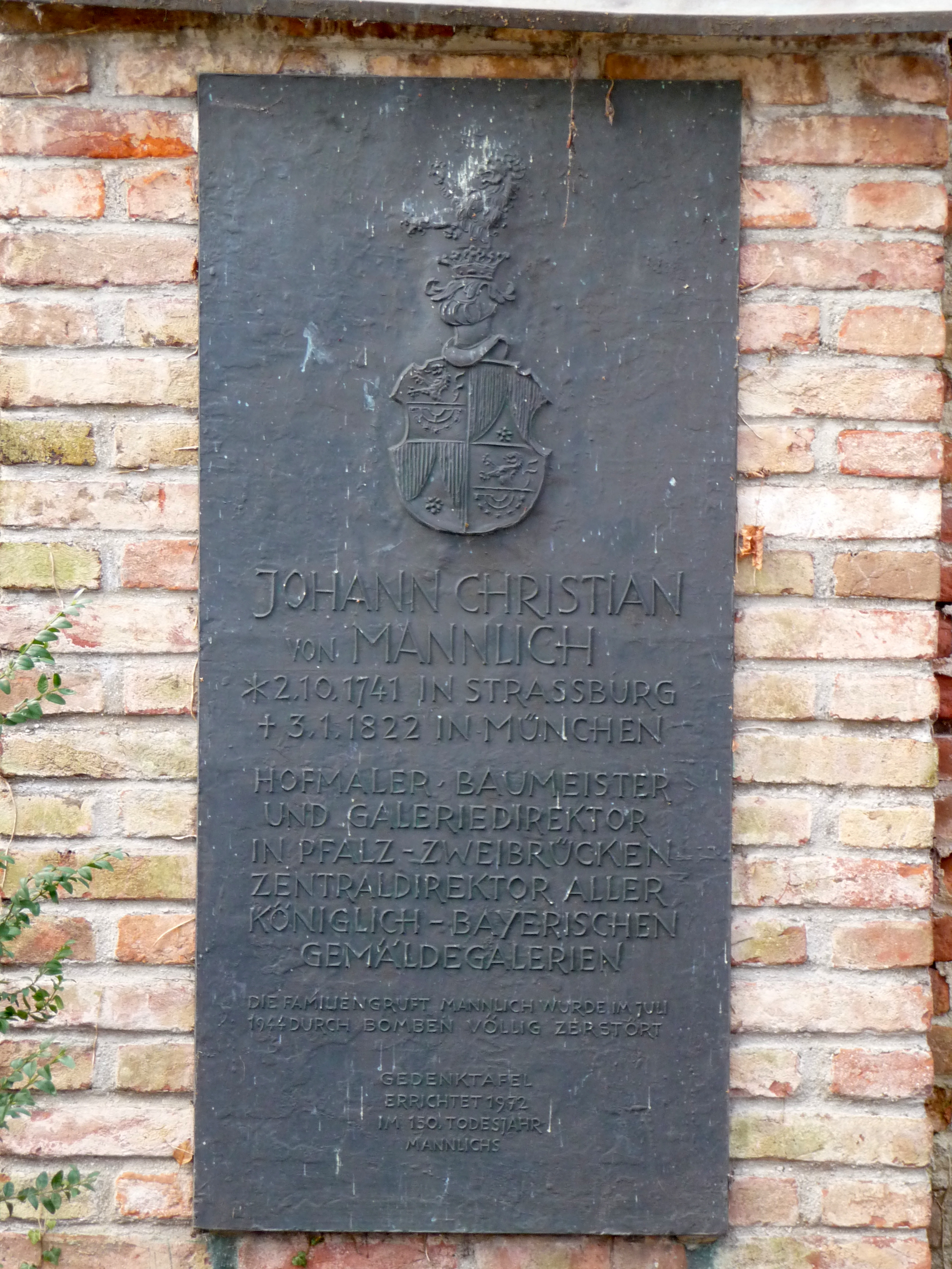 Grabmal von Johann Christian Mannlich im Alten Südfriedhof (München)